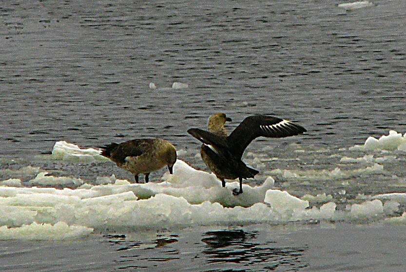 South Polar Scua, feeding, 16 December 2009, Ross Sea, Antarctica